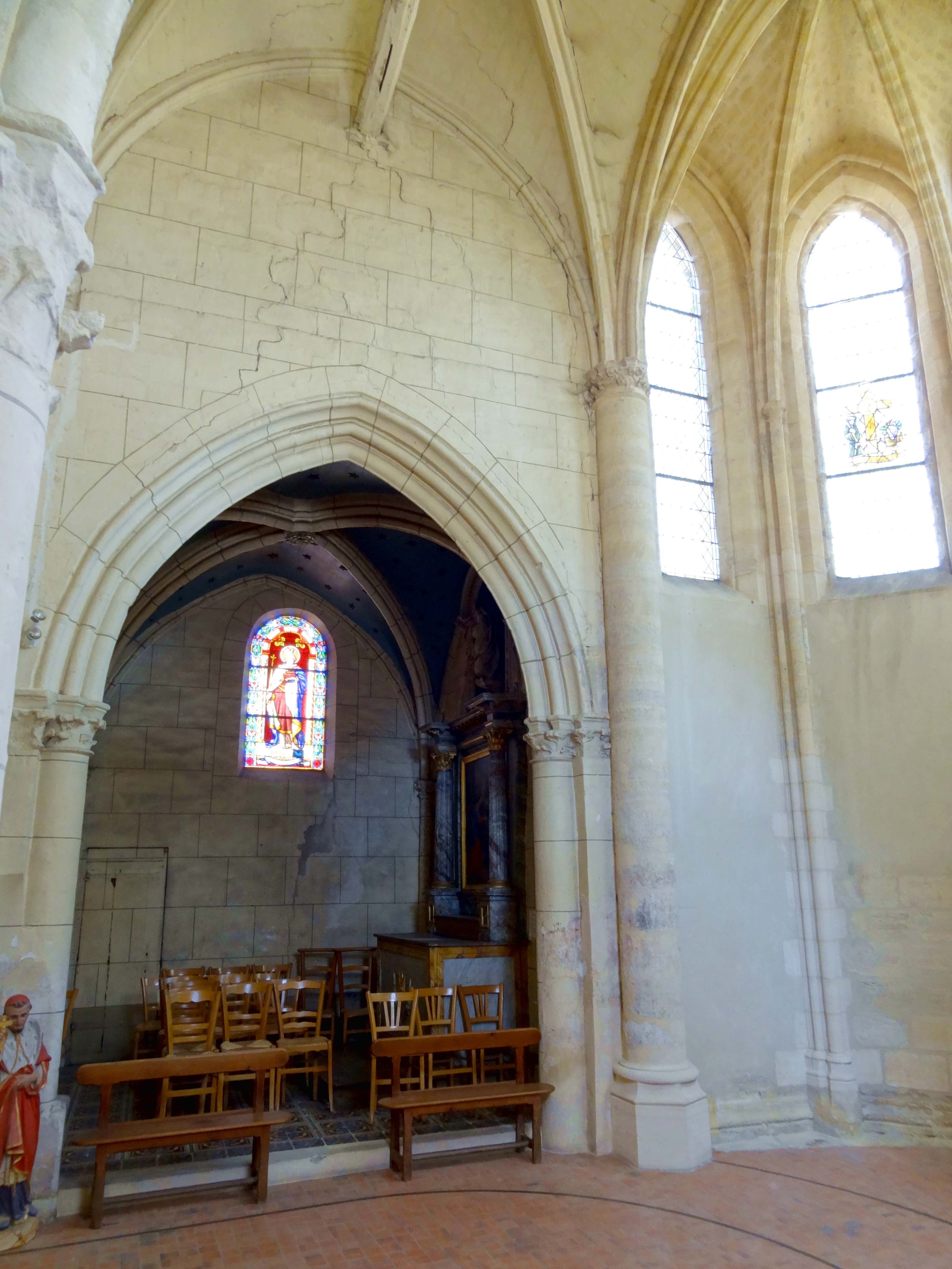 Intérieur de l'église - voir titre.